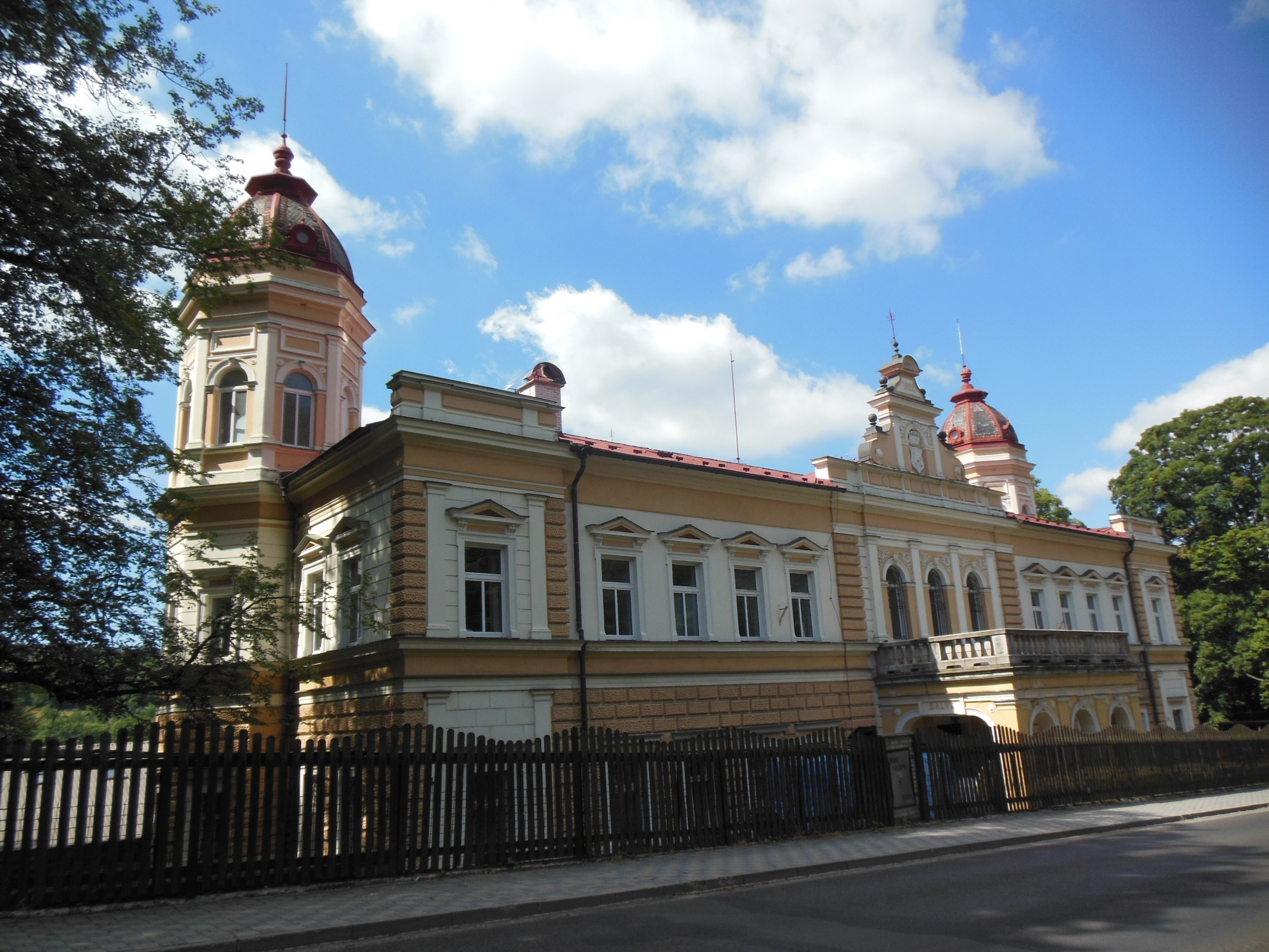 Zámek v ulici Karlovarská v Nejdku (okres Karlovy Vary).